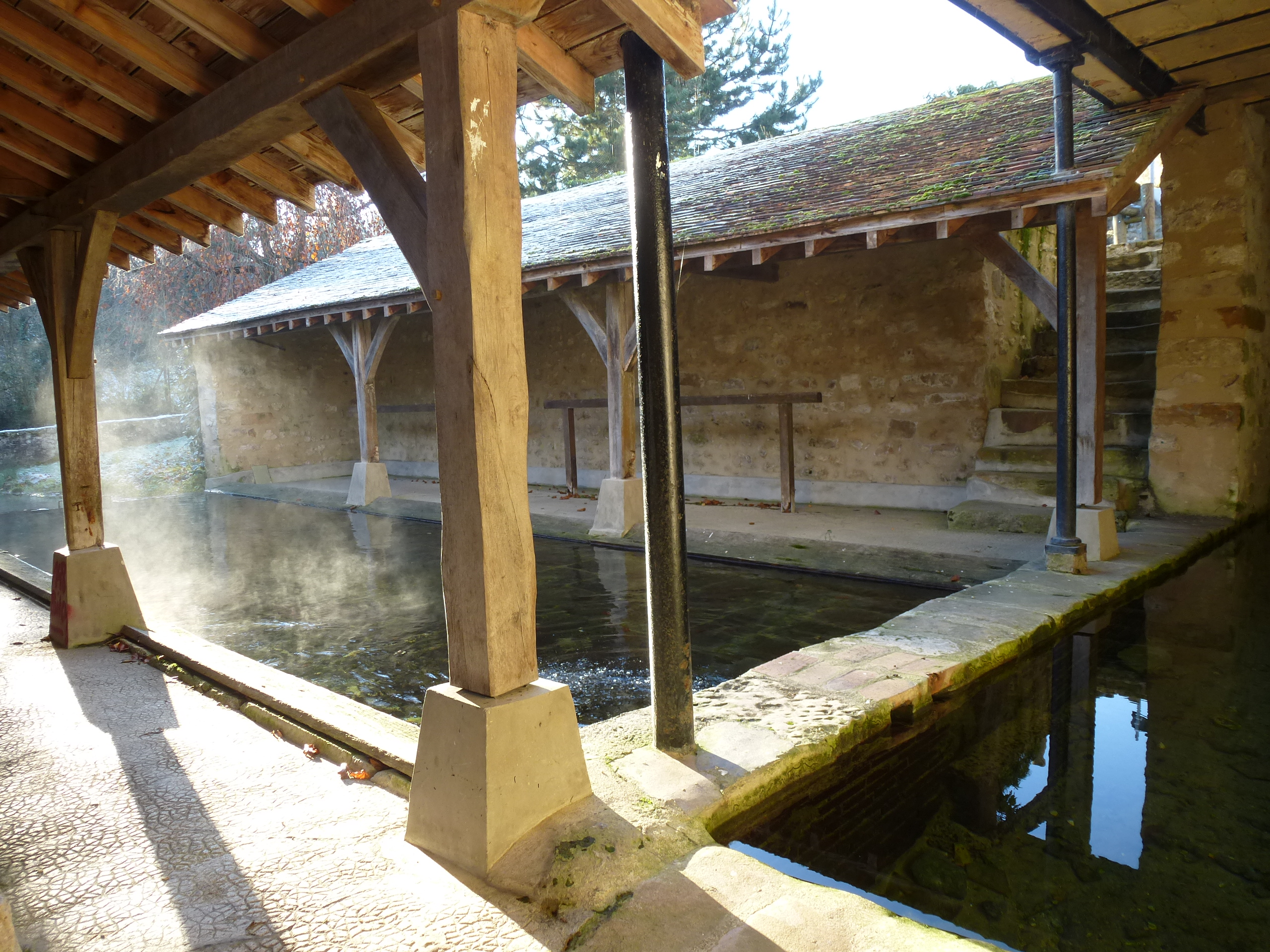 Lavoir et fontaine Saint-Laurent. (Laval-en-Brie, département de la Seine-et-Marne, région Île-de-France).